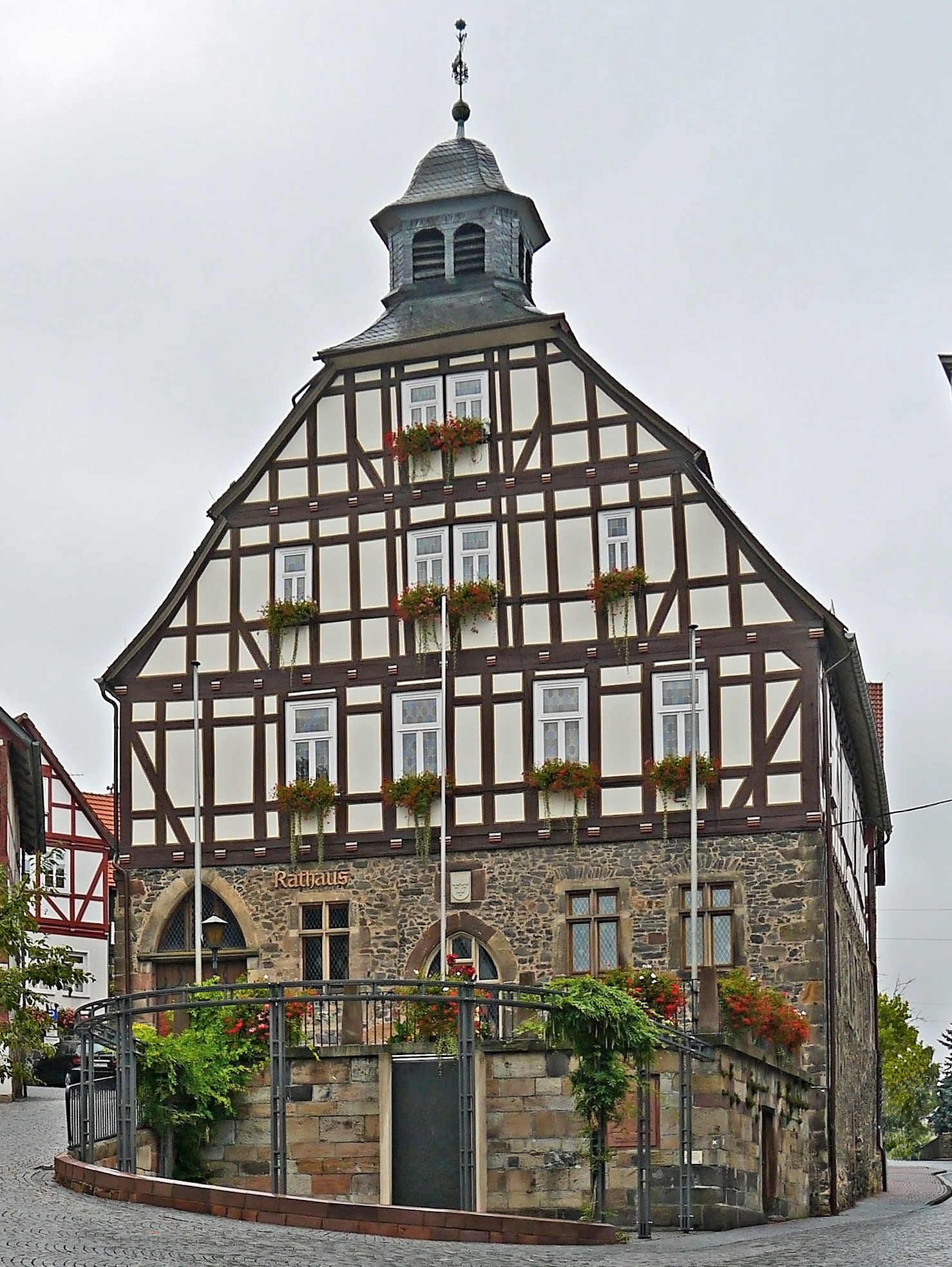 Das Rathaus (2013) in Homberg (Efze).